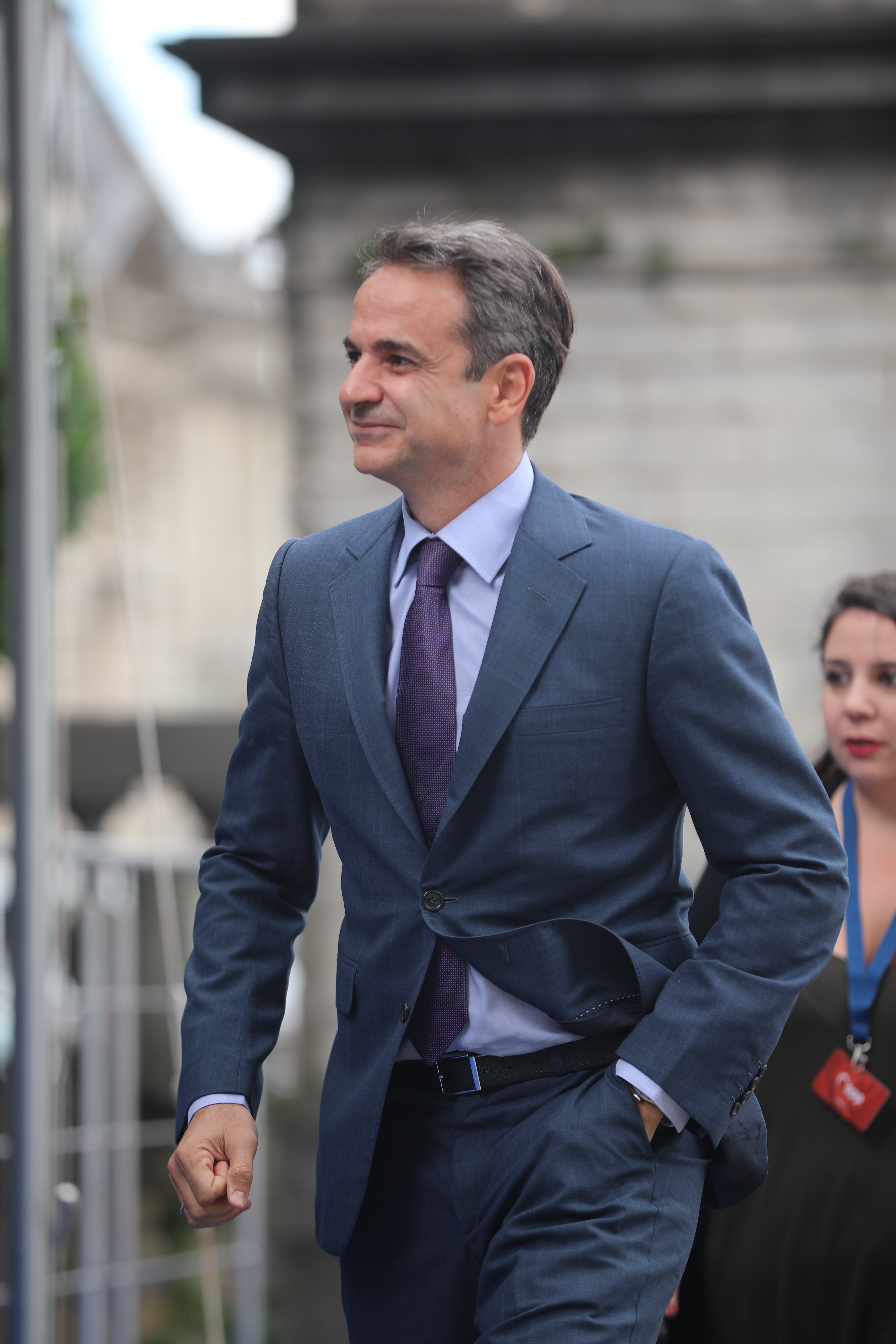 EPP Summit, 20 June 2019 Brussels